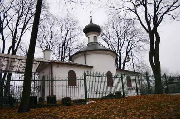 Białystok. Cerkiew św. Marii Magdaleny położona na obrzeżach Parku Centralnego.